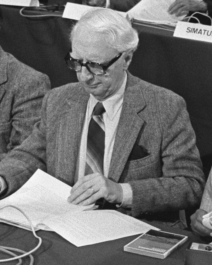 Openbare hoorzitting kernwapens en ontwapening, georganiseerd door de Wereldraad van Kerken in de VU. (...) Olle Dahlén, (...)